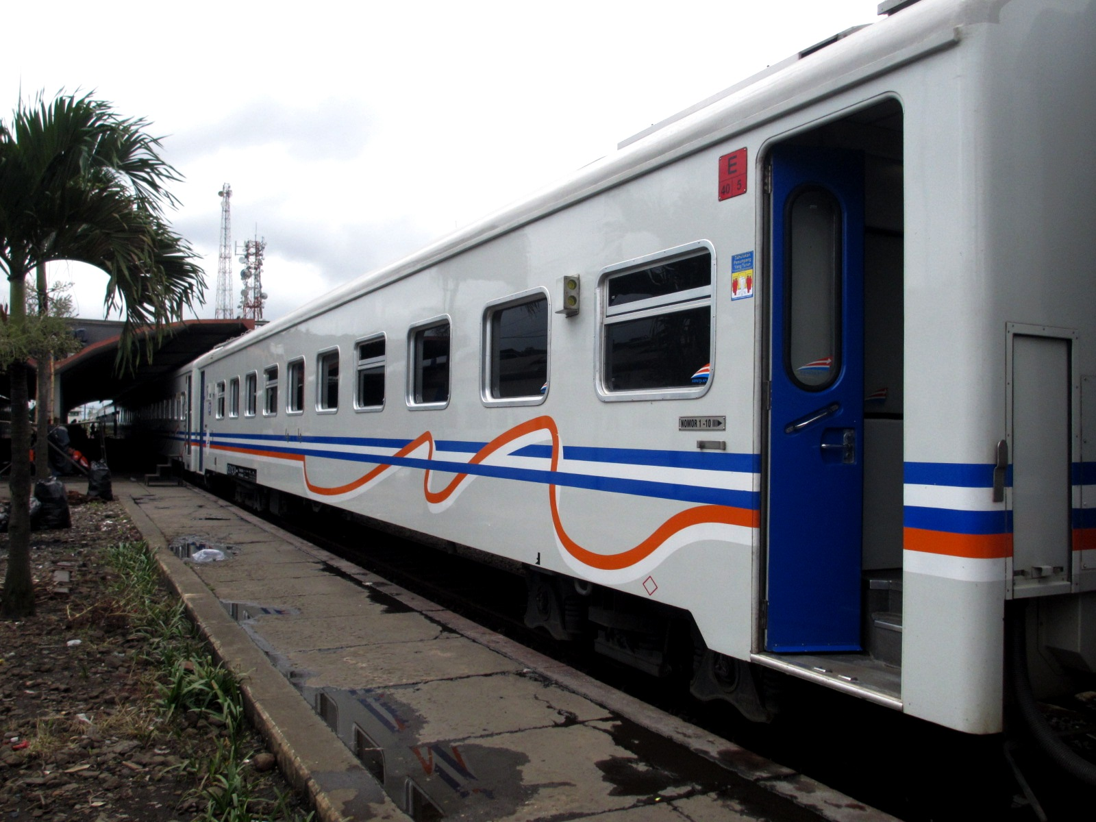 Eksterior kereta ekonomi KA Jayabaya.